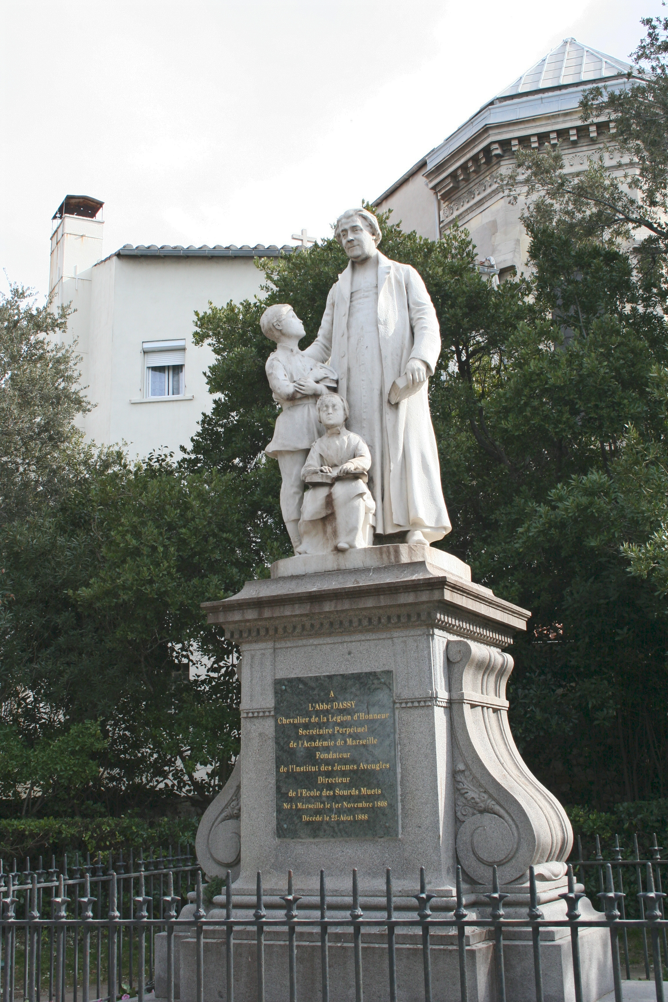 Statue de l'abbé Dassy par Alexandre Falguière dans le jardin Puget à Marseille.